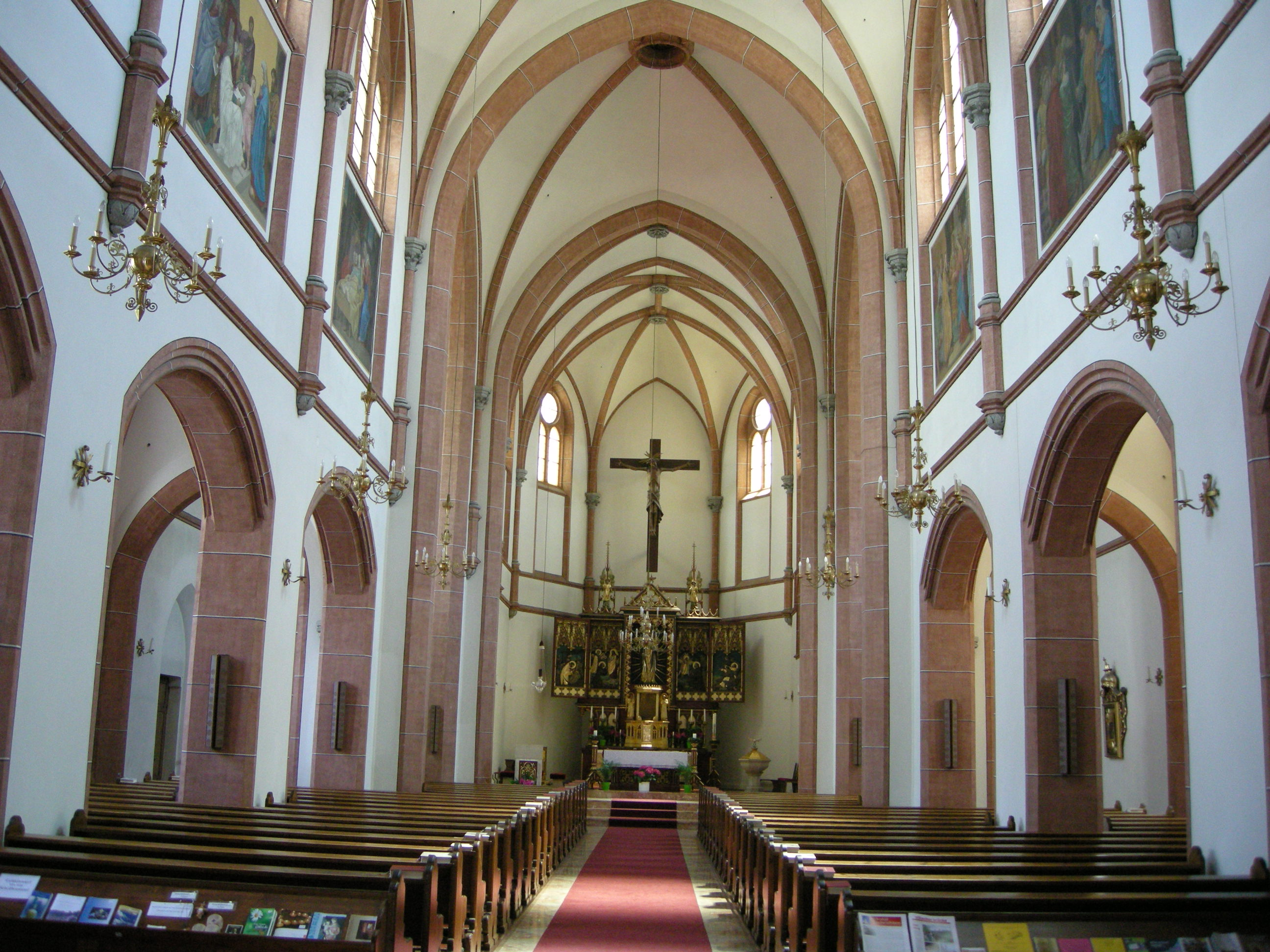 Villach, sankt nikolaj